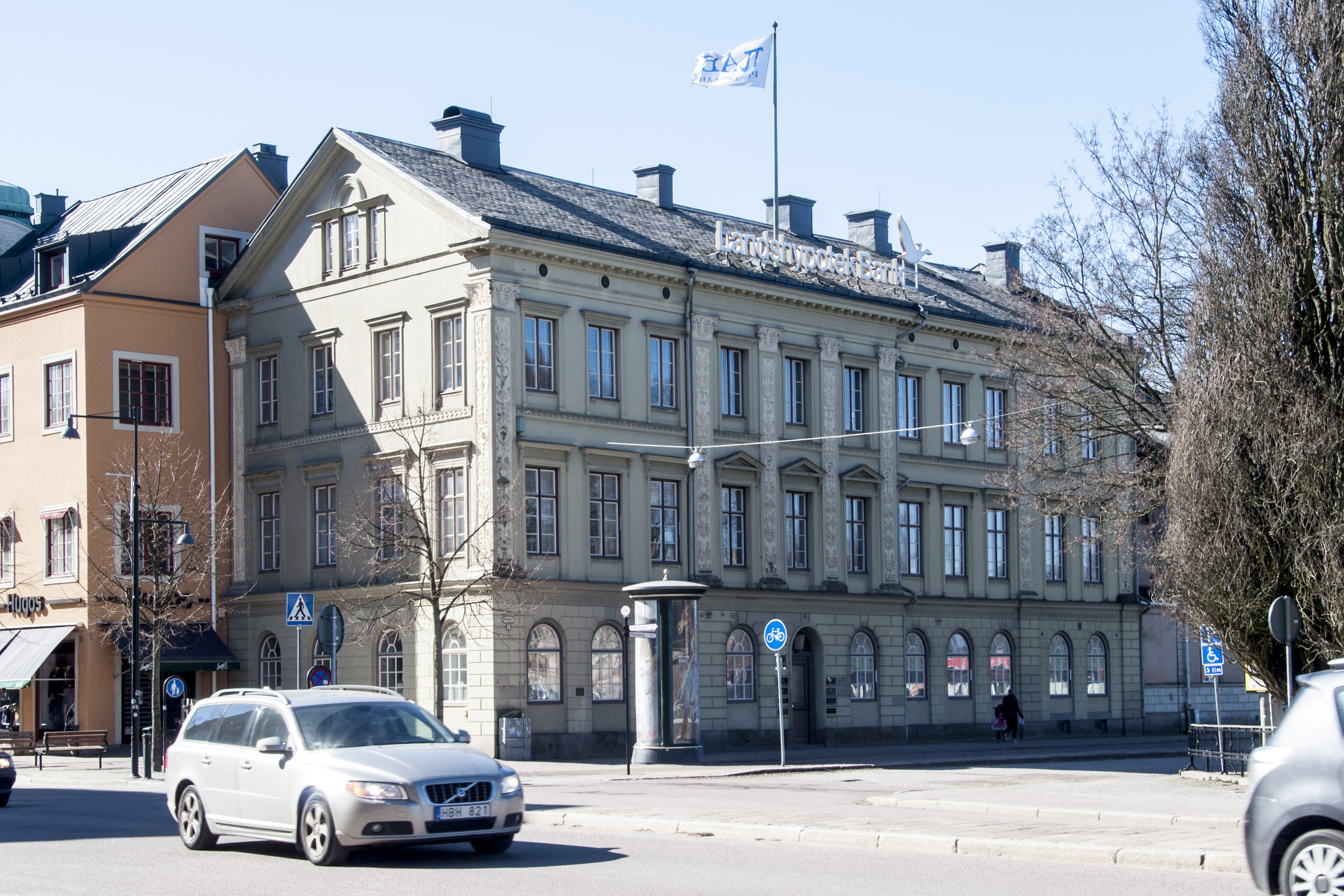 Hypoteksföreningens hus, Karlstad. Byggnadsår 1853, efter ritningar av byggmästaren Jonas Jonsson (1806-1885) från Linköping